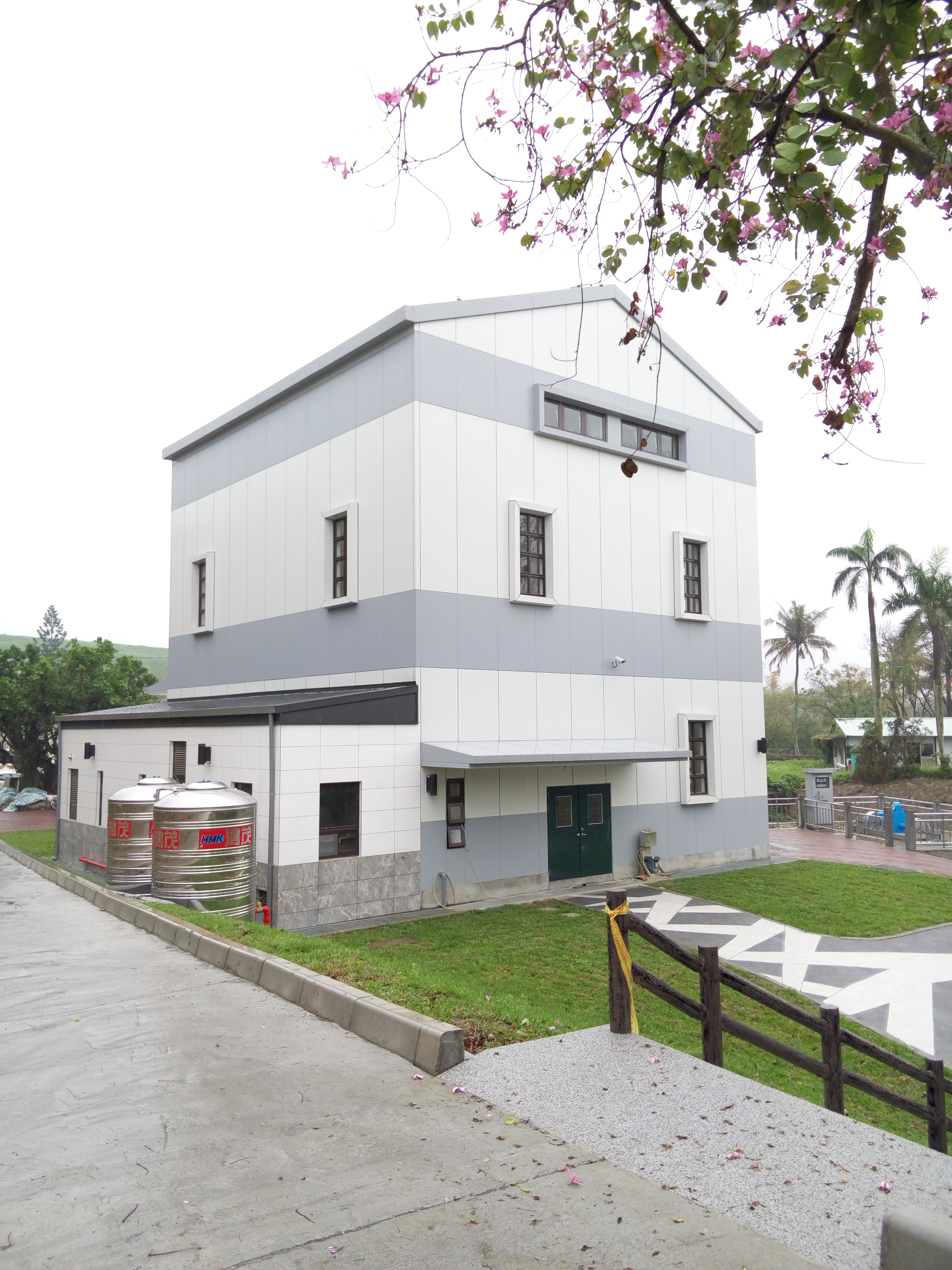 八田水力發電廠廠房外觀